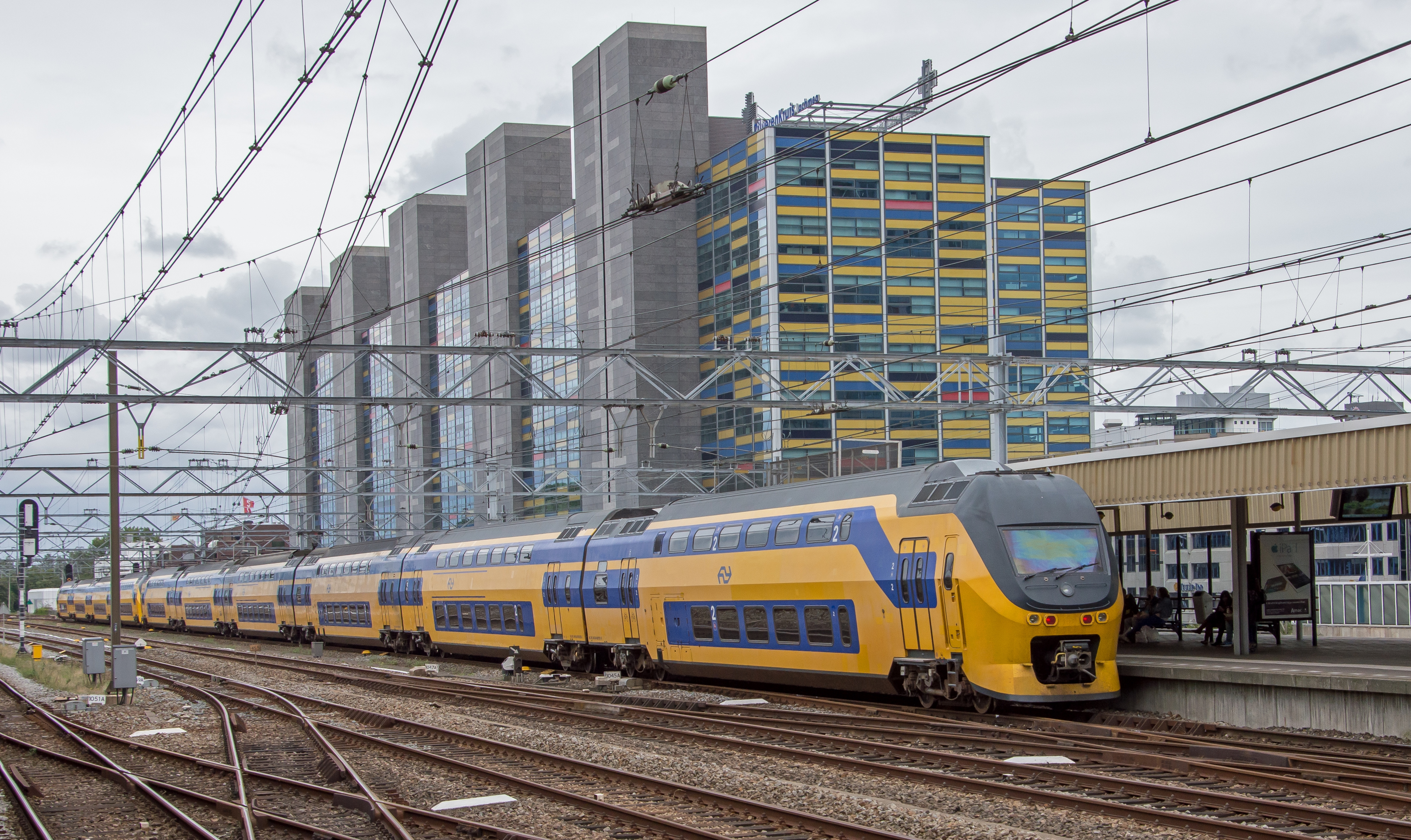 Leiden, IRM 9553-8664 als IC naar Lelystad